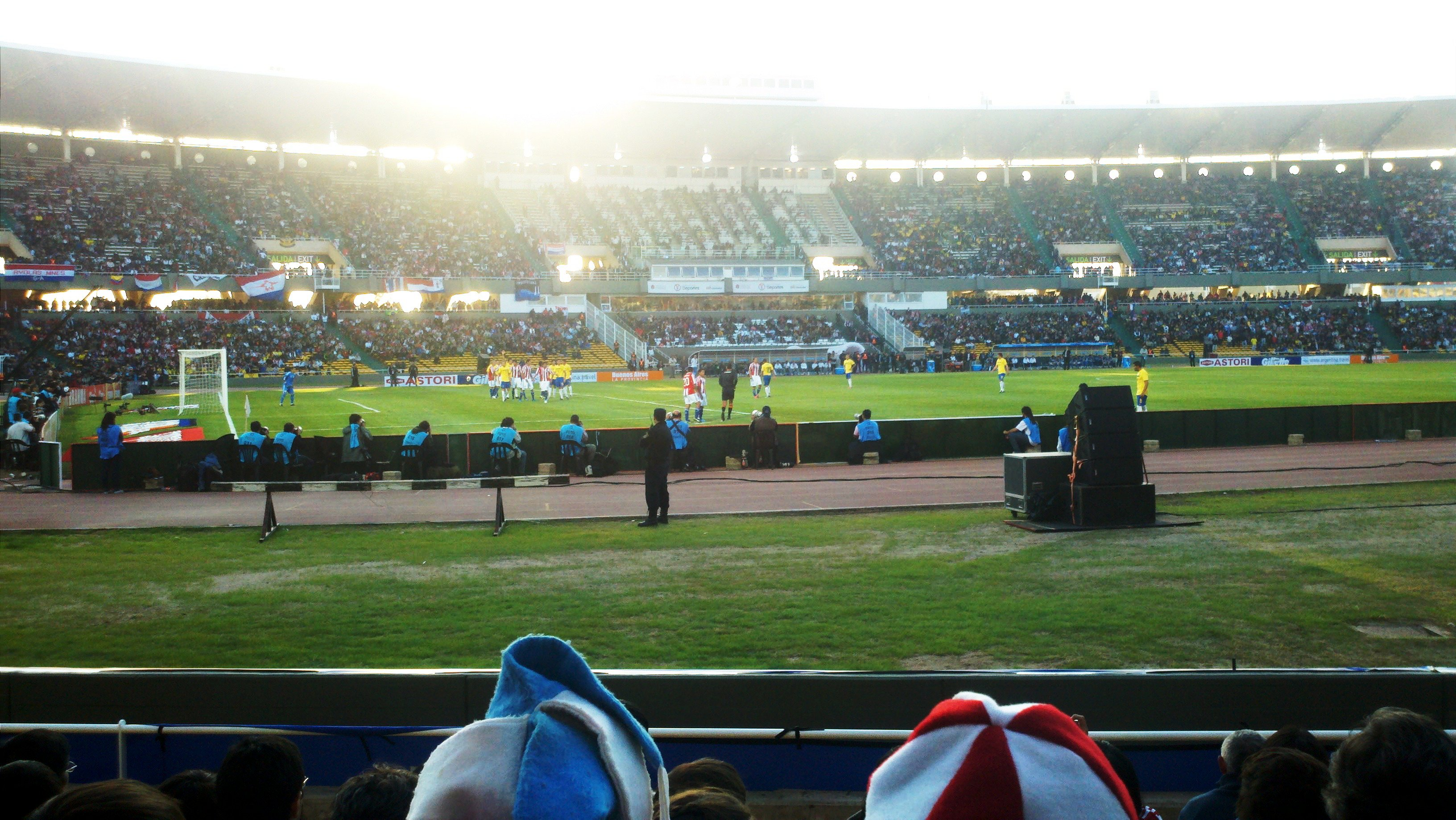 tiro libre de brasil